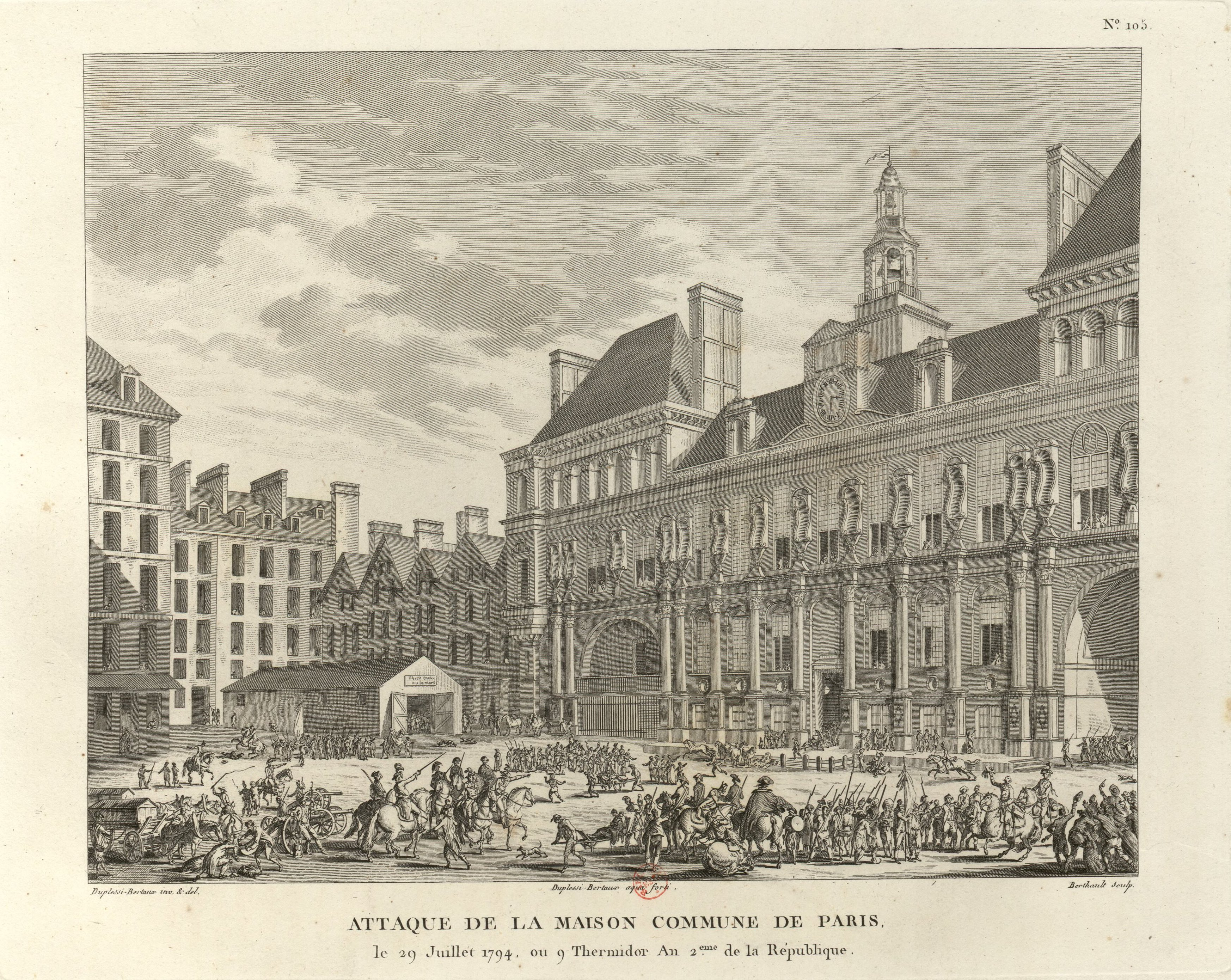 Attaque de la maison commune de Paris, le 29 juillet 1794, ou 9 thermidor, an 2.